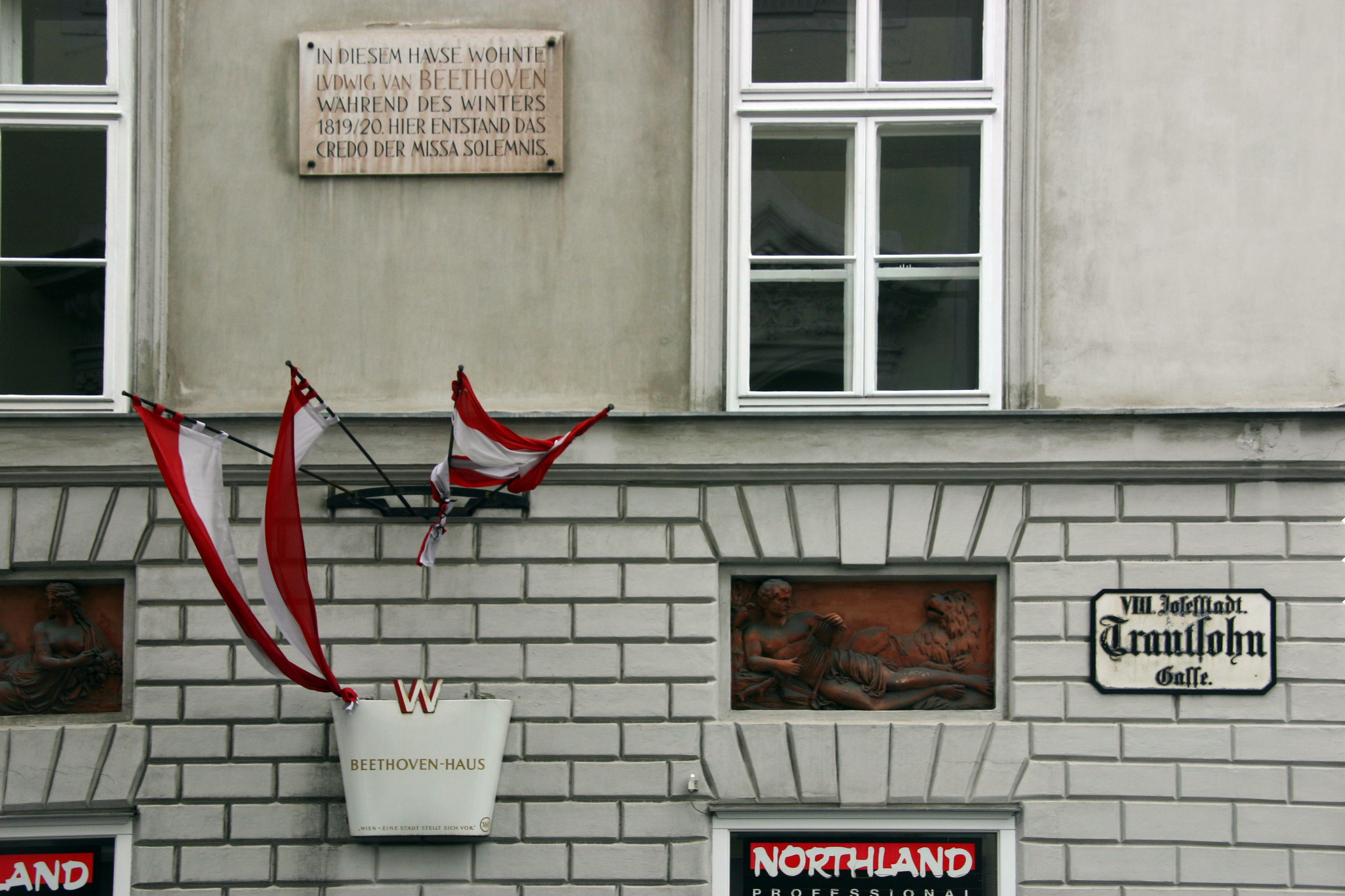 Josefstadt in Wien